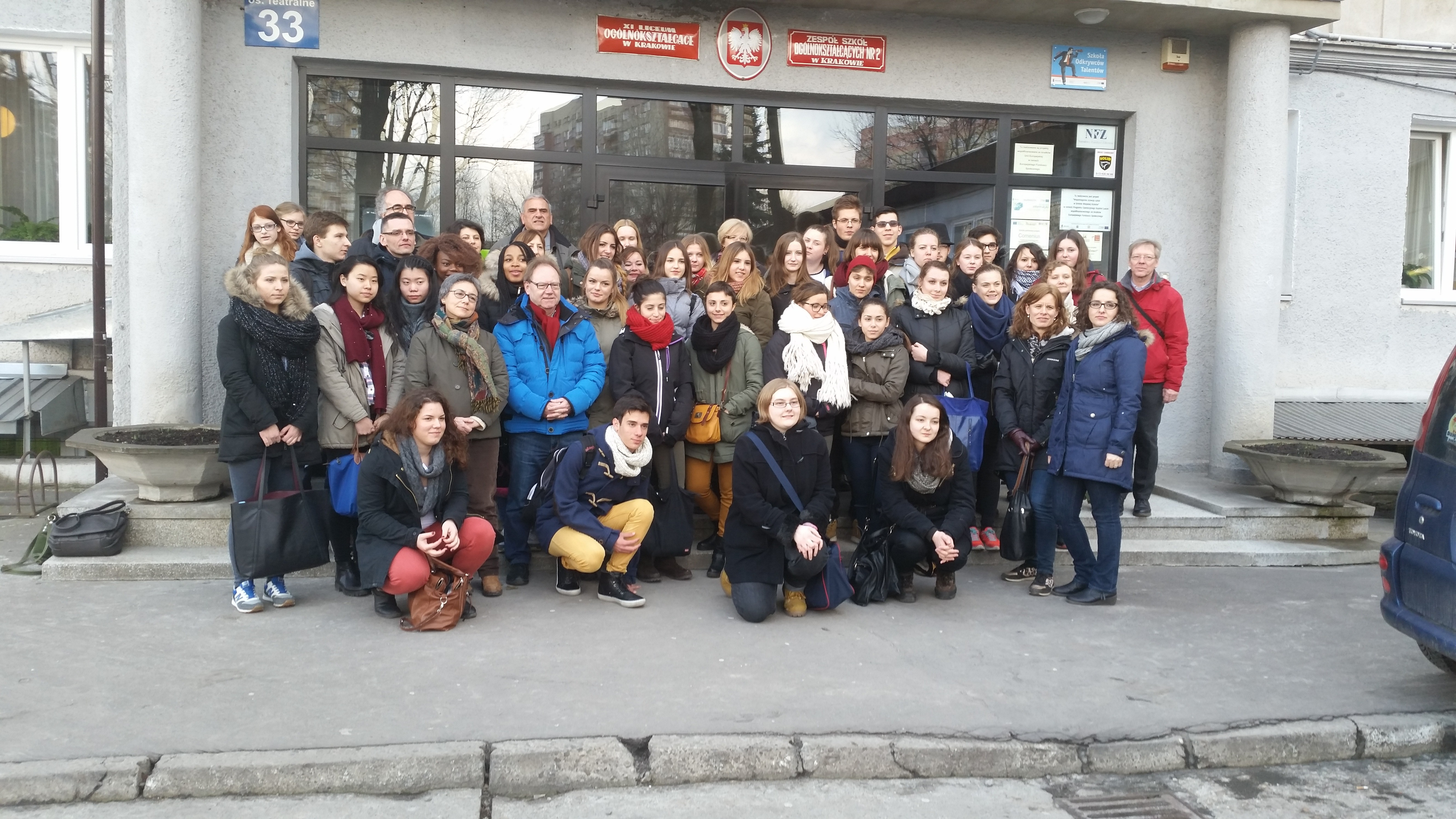 d